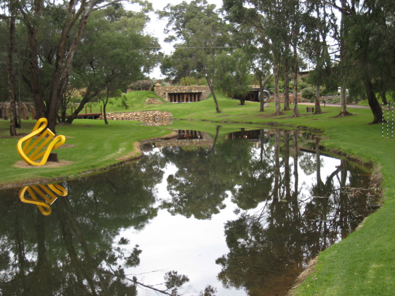 Vasse Felix Winery